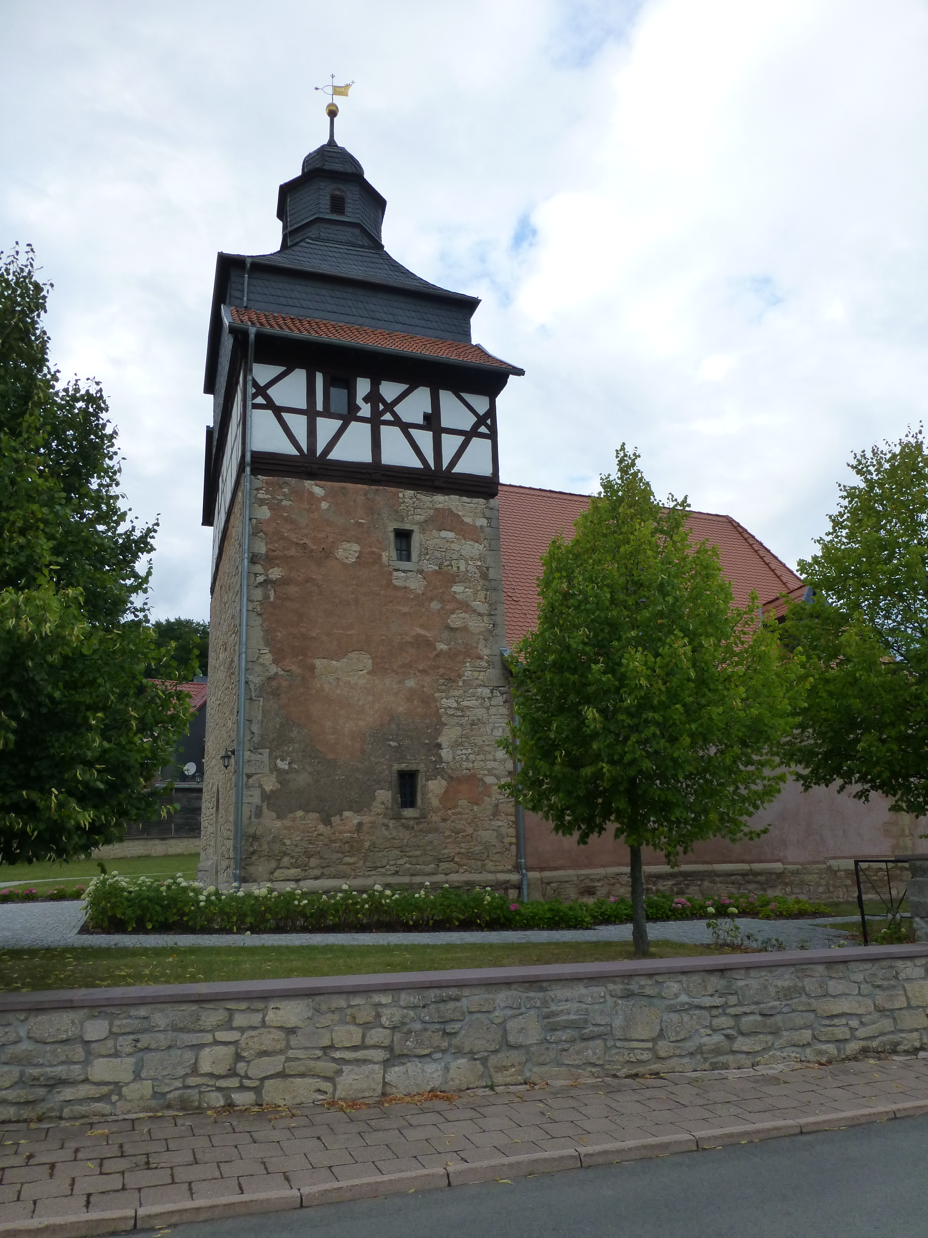 Die Kirche in Kirchohmfeld